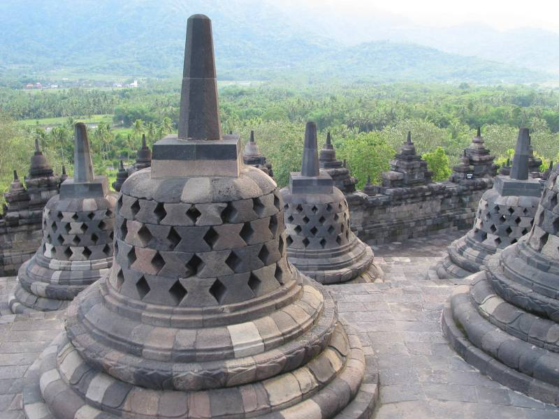 Borobudur